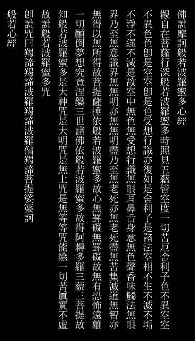 Sutra Serca (般若心経)